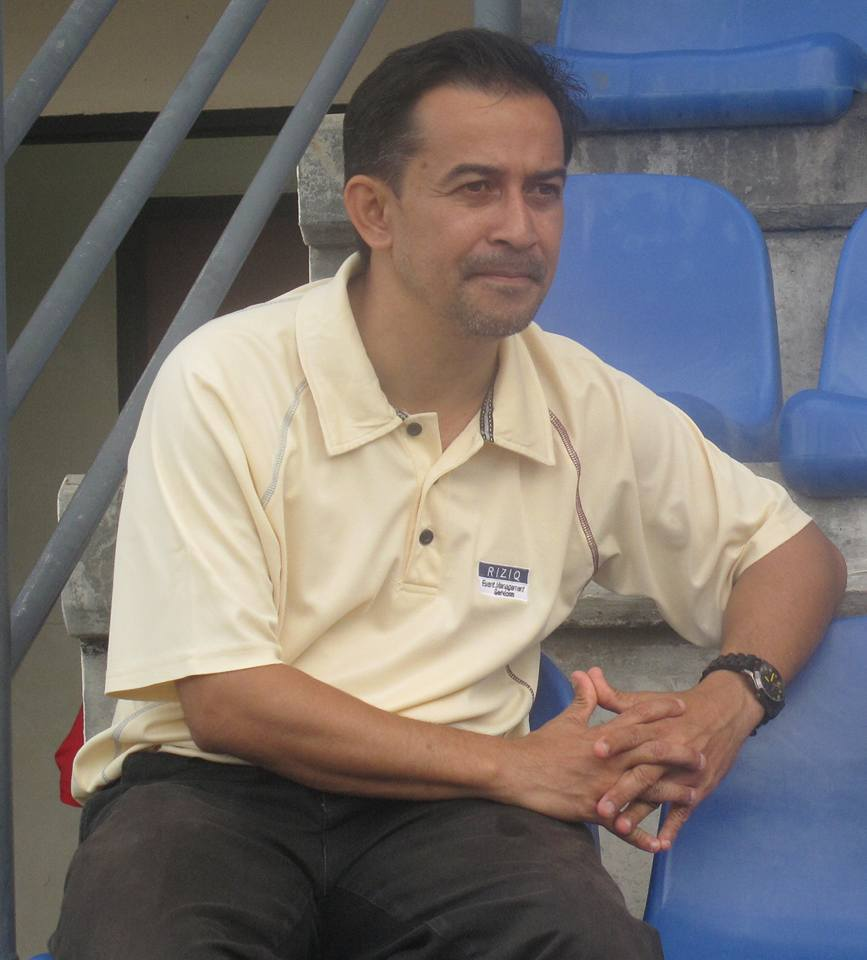 Johari Haji Bungsu ialah Timbalan Presiden Ke-II WBC dan telah meninggal dunia pada 2016